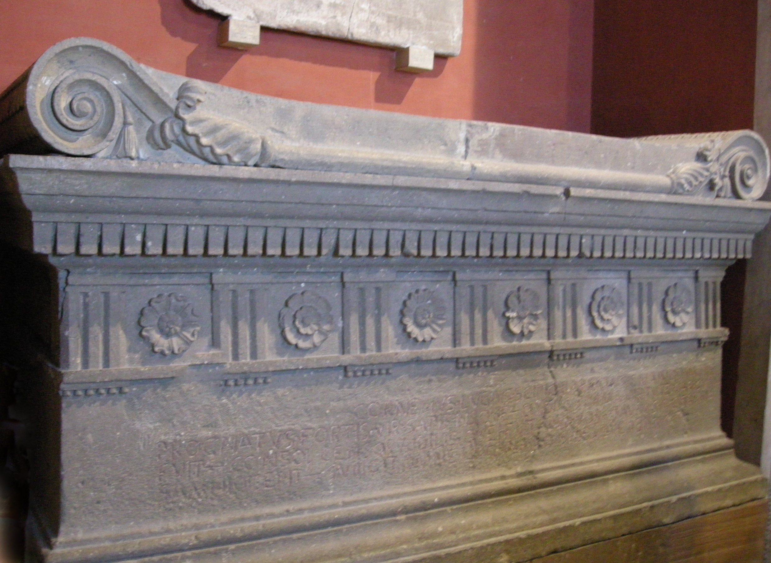 Sarcofago di scipione barbato